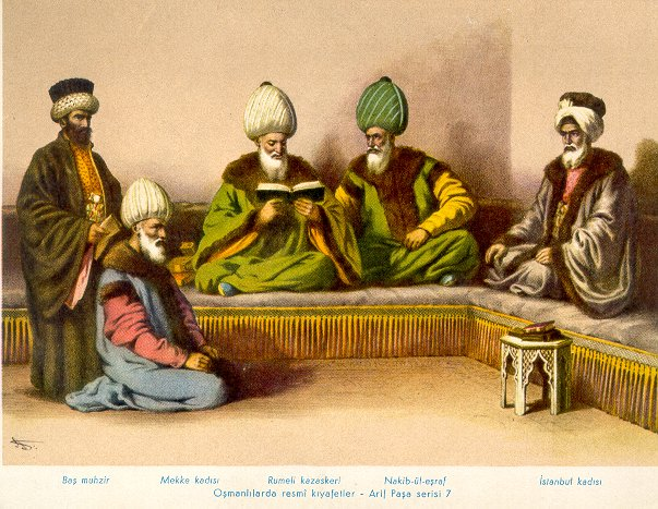 Baş Muhzir Sadaret Dairesi Muhafızı Mekke Kadısı Mekke Baş Hakimi Rumeli Kazaskeri Rumelideki Kadıların Amiri Nakib-ül-eşraf Peygamber Soyundan Olanların Başı İstanbul Kadısı İstanbul Baş Hakimi